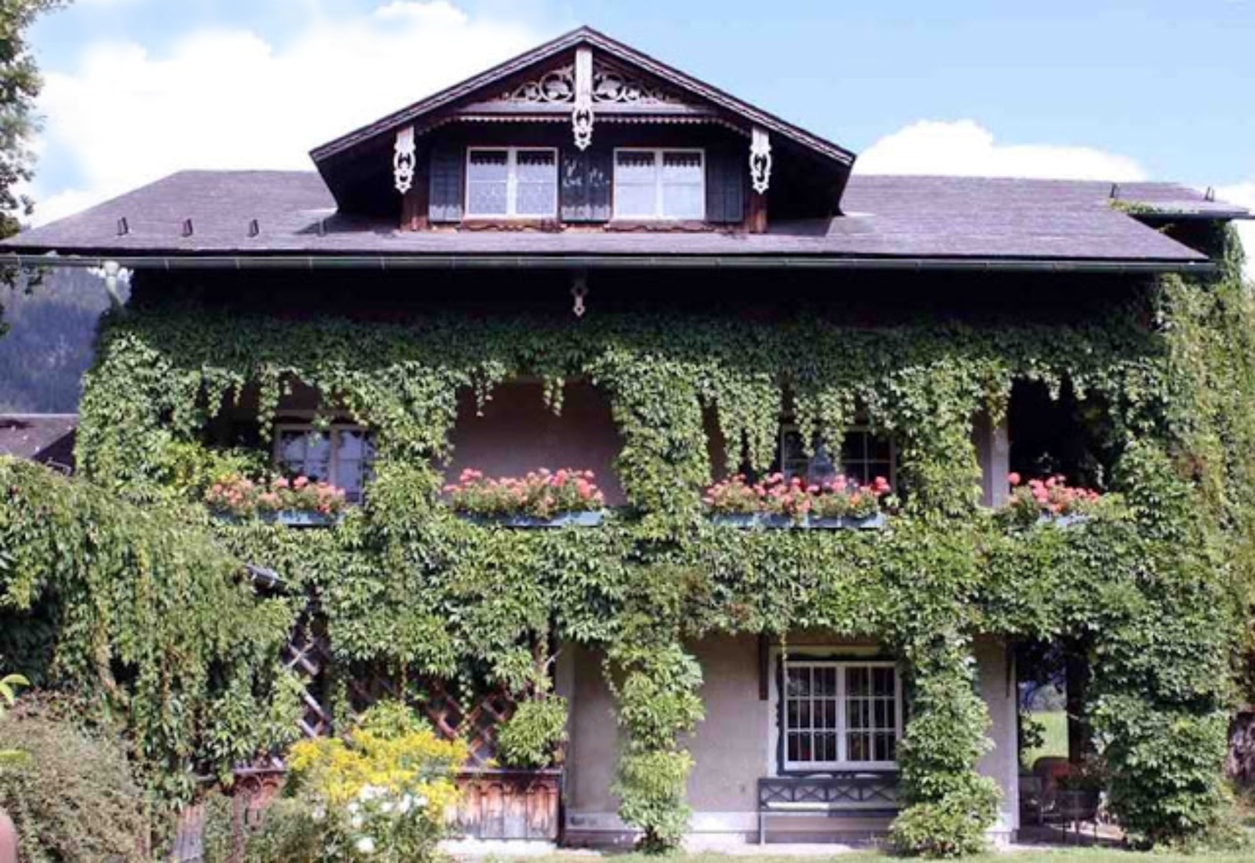 Die Villa Königsgarten, im 19. Jahrhundert von Carl von Binzer erbaut, war Treffpunkt, Wohn- und Arbeitsort zahlreicher Künstler in Altaussee. Sie wurde vom heutigen Besitzer Prof. Horst K. Jandl nach den Originalplänen restauriert.